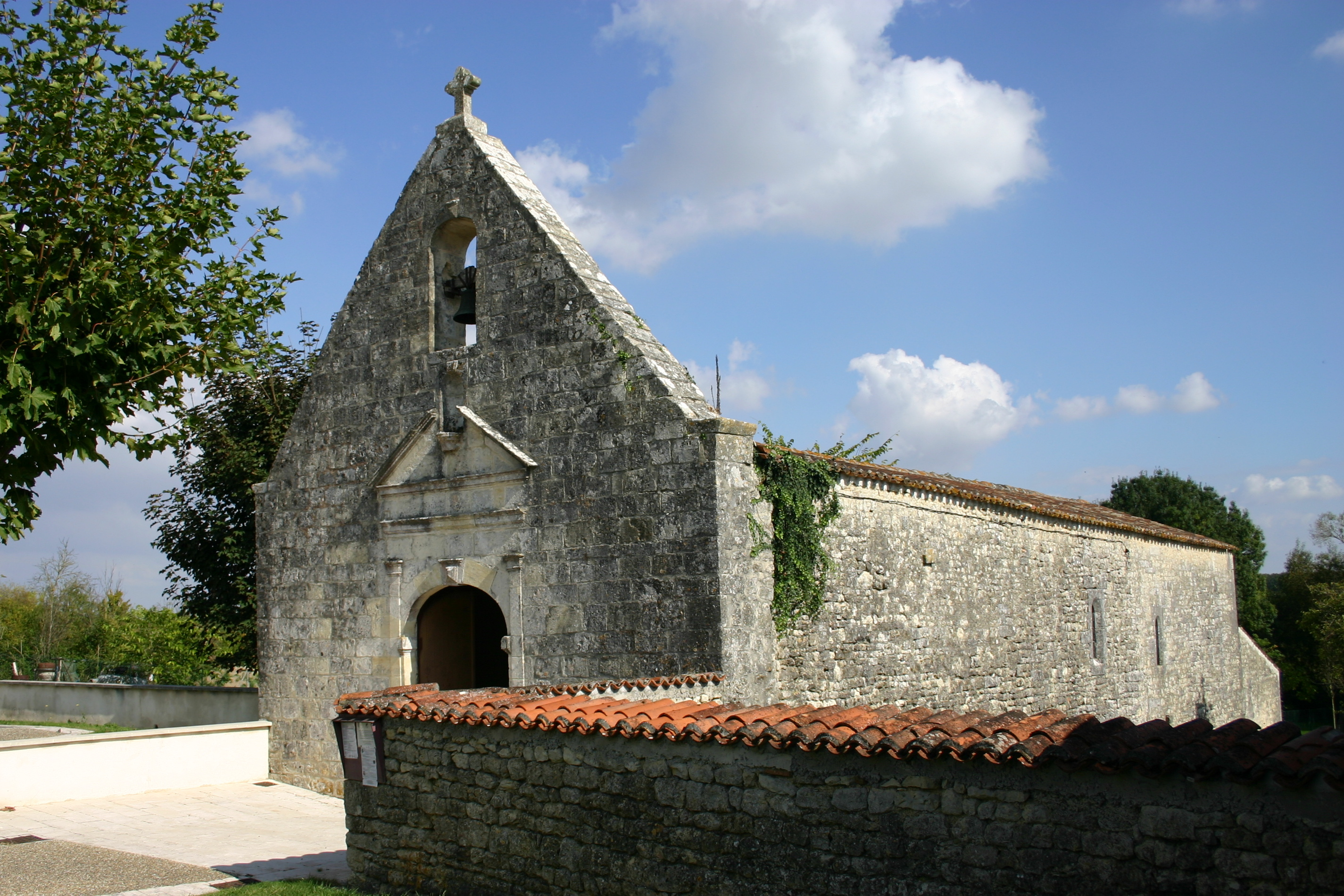 Église de Torxé